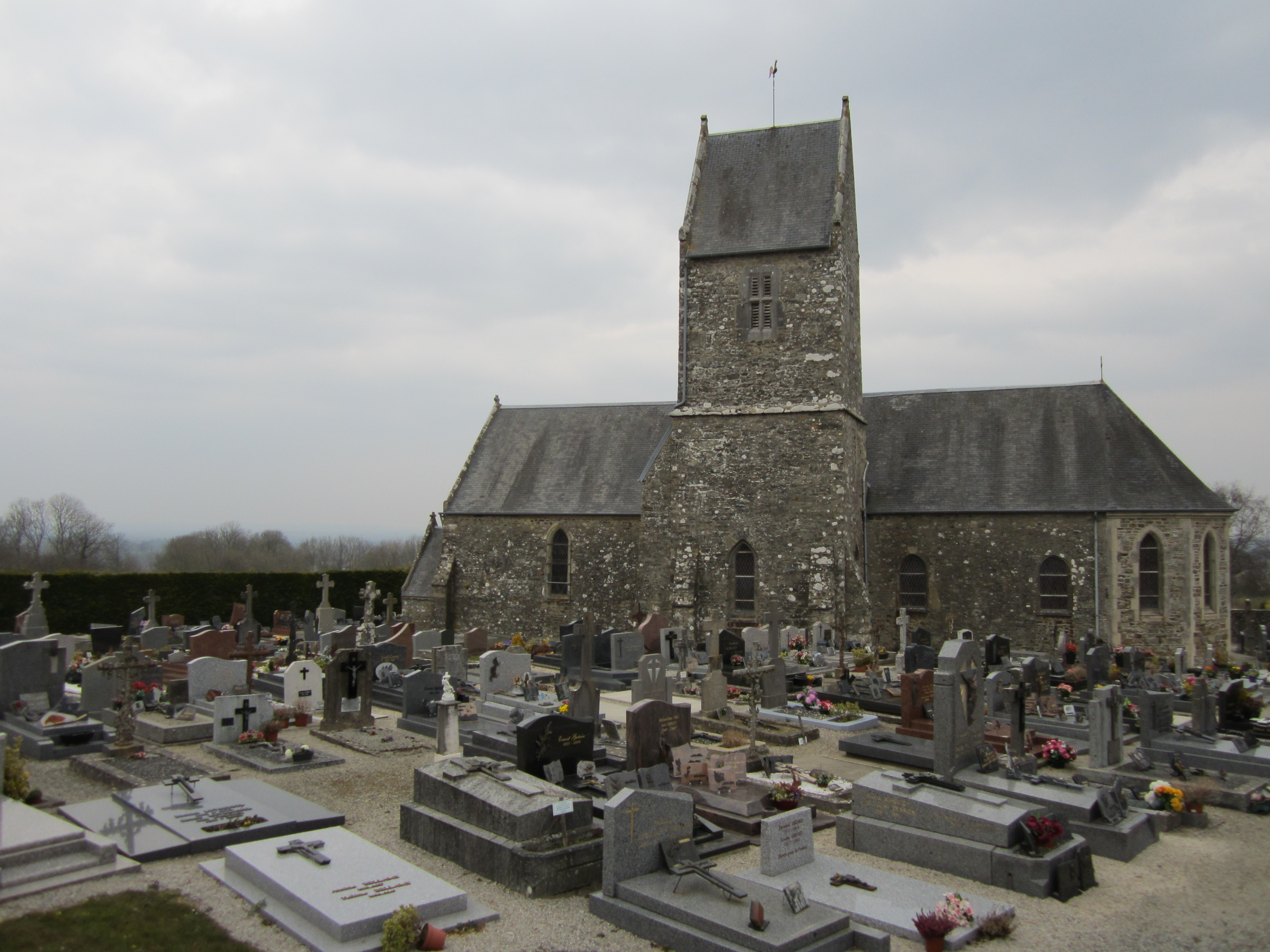 Église Saint-Martin de Monthuchon